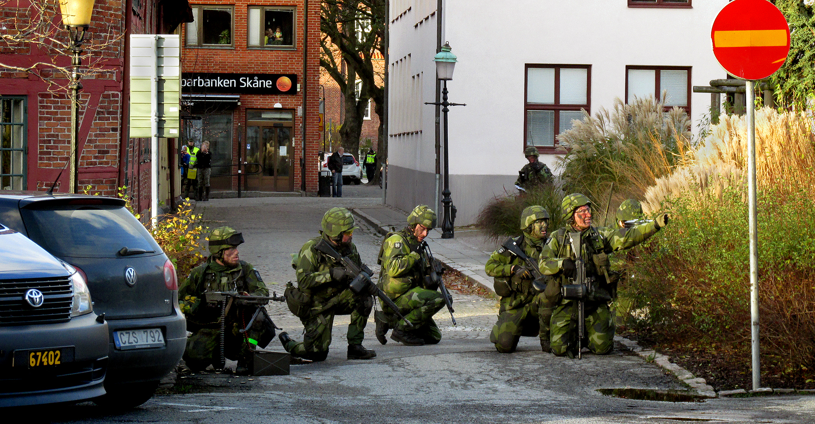 Militärövning i Ystad. Södra skånska regementet P7. 14 nov 2015. Rådhuset i Ystad försvaras.